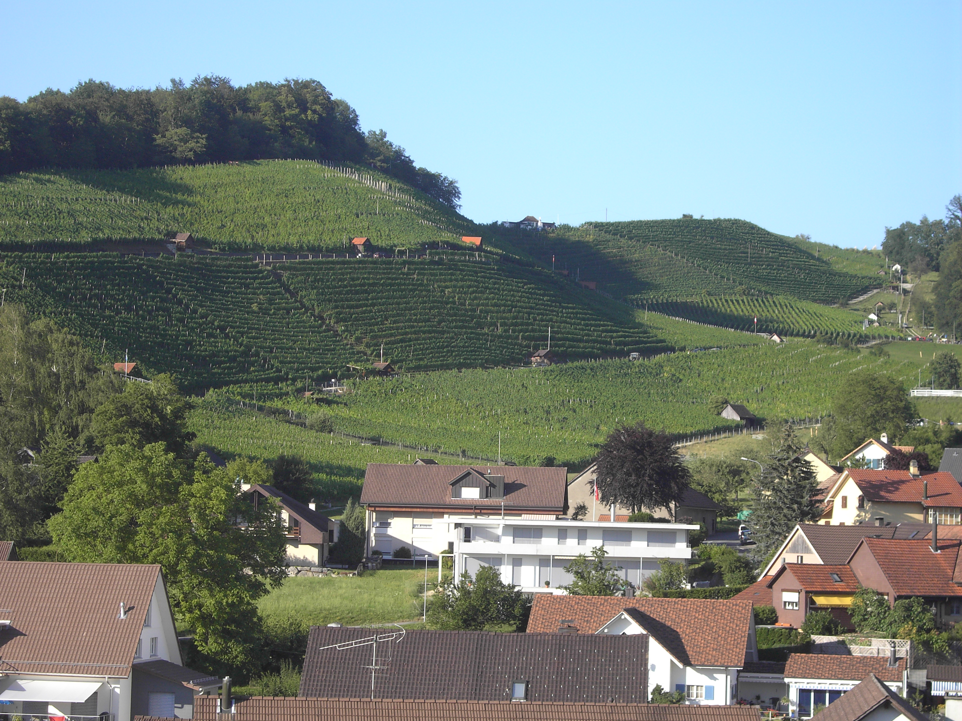 Birmenstorf, vineyard/Rebberg